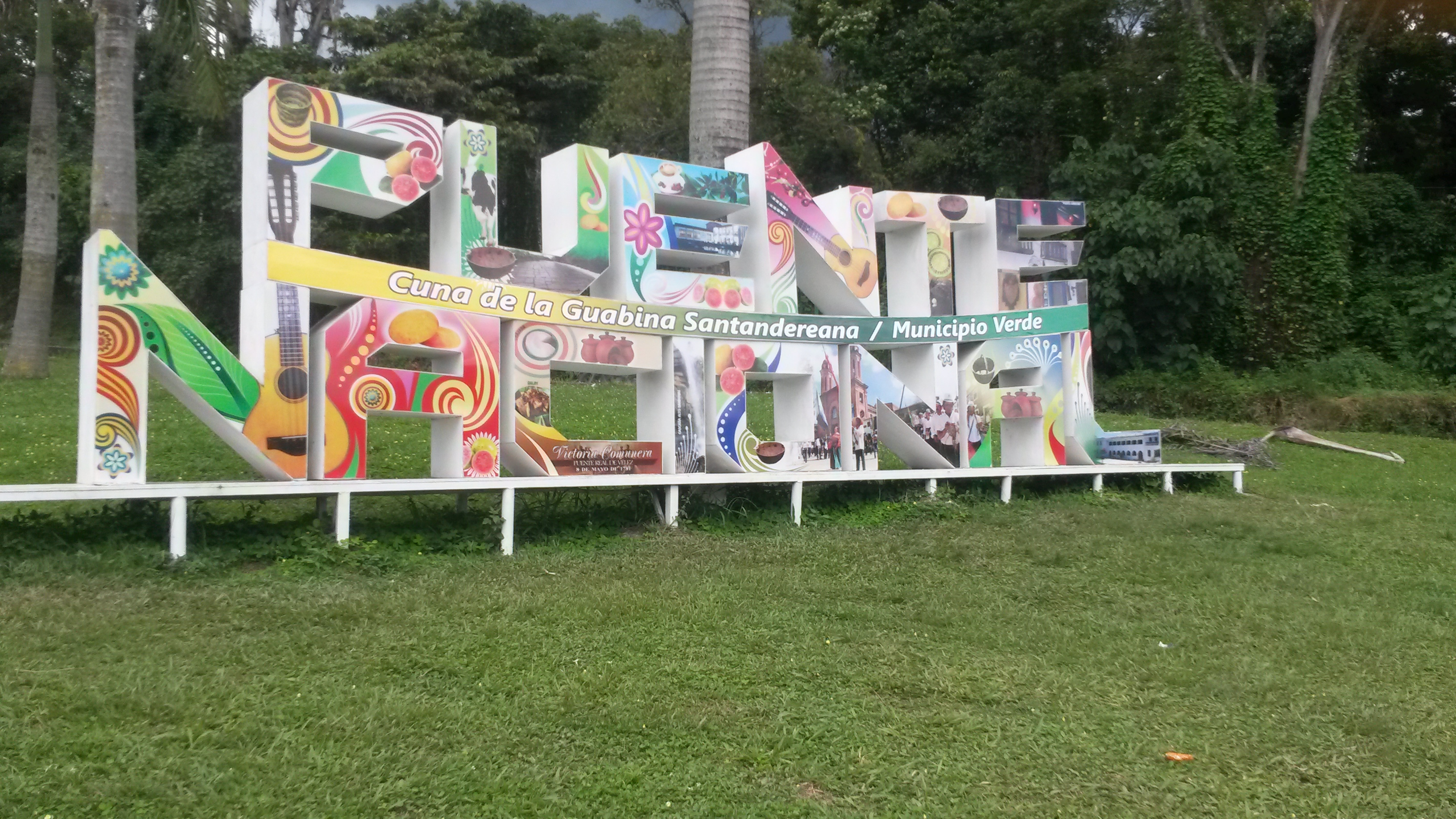 Monumento ubicado cerca a Puente Nacional